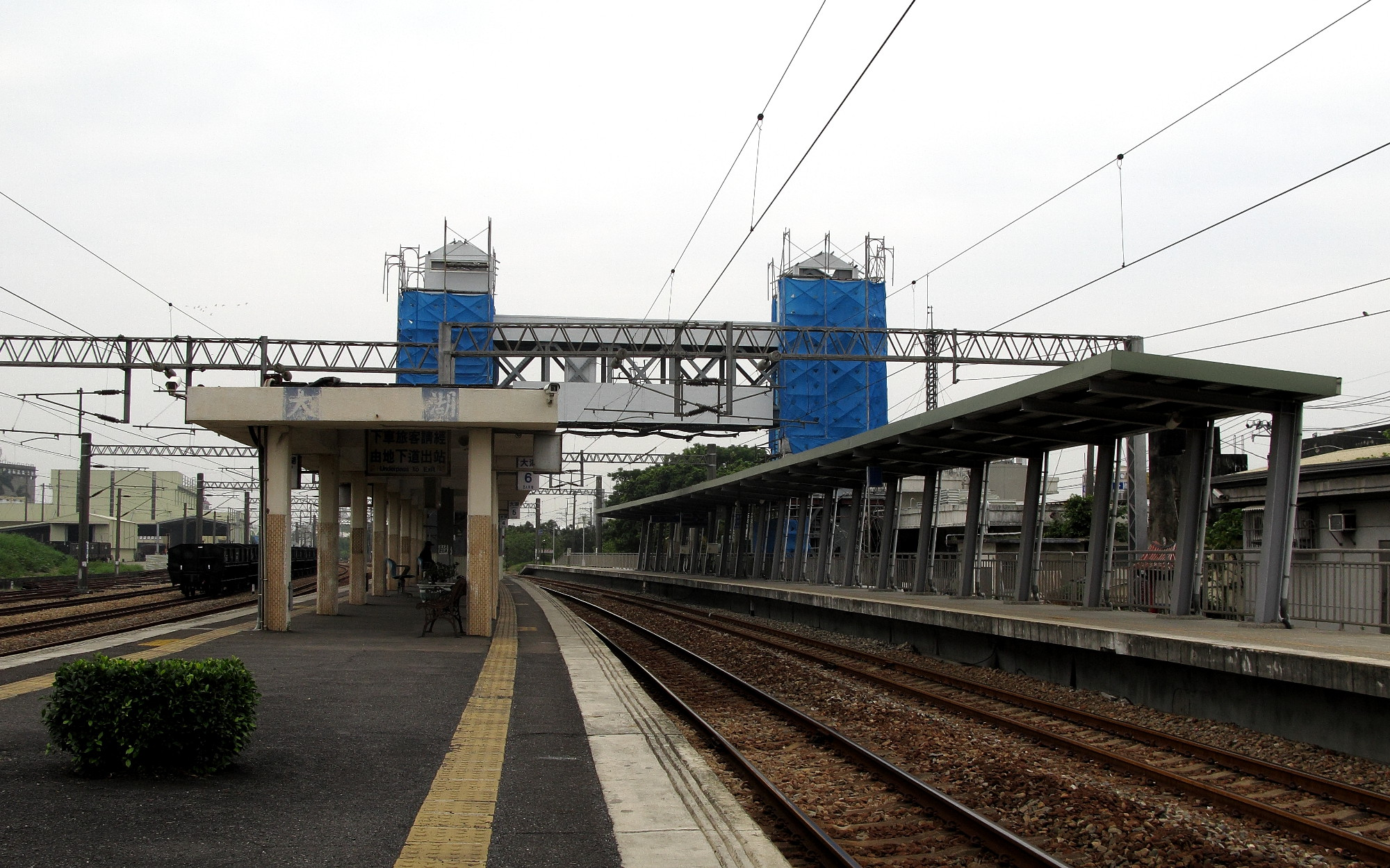 中文（台灣）: 臺灣鐵路管理局大湖車站第二月台（左）與第一月台（右）。